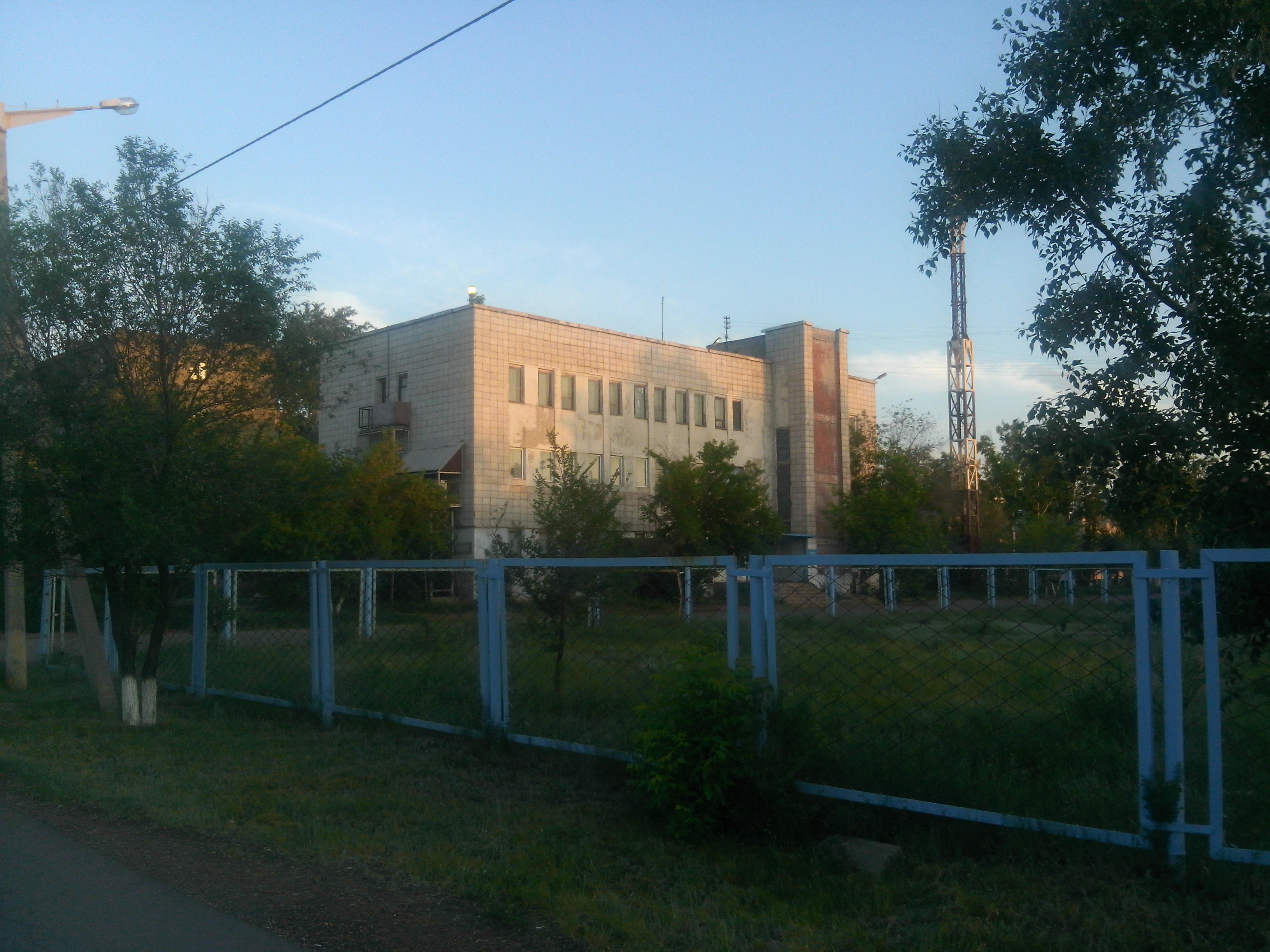 Автоматическая телефонная станция (АТС № 3) в городе Экибастузе